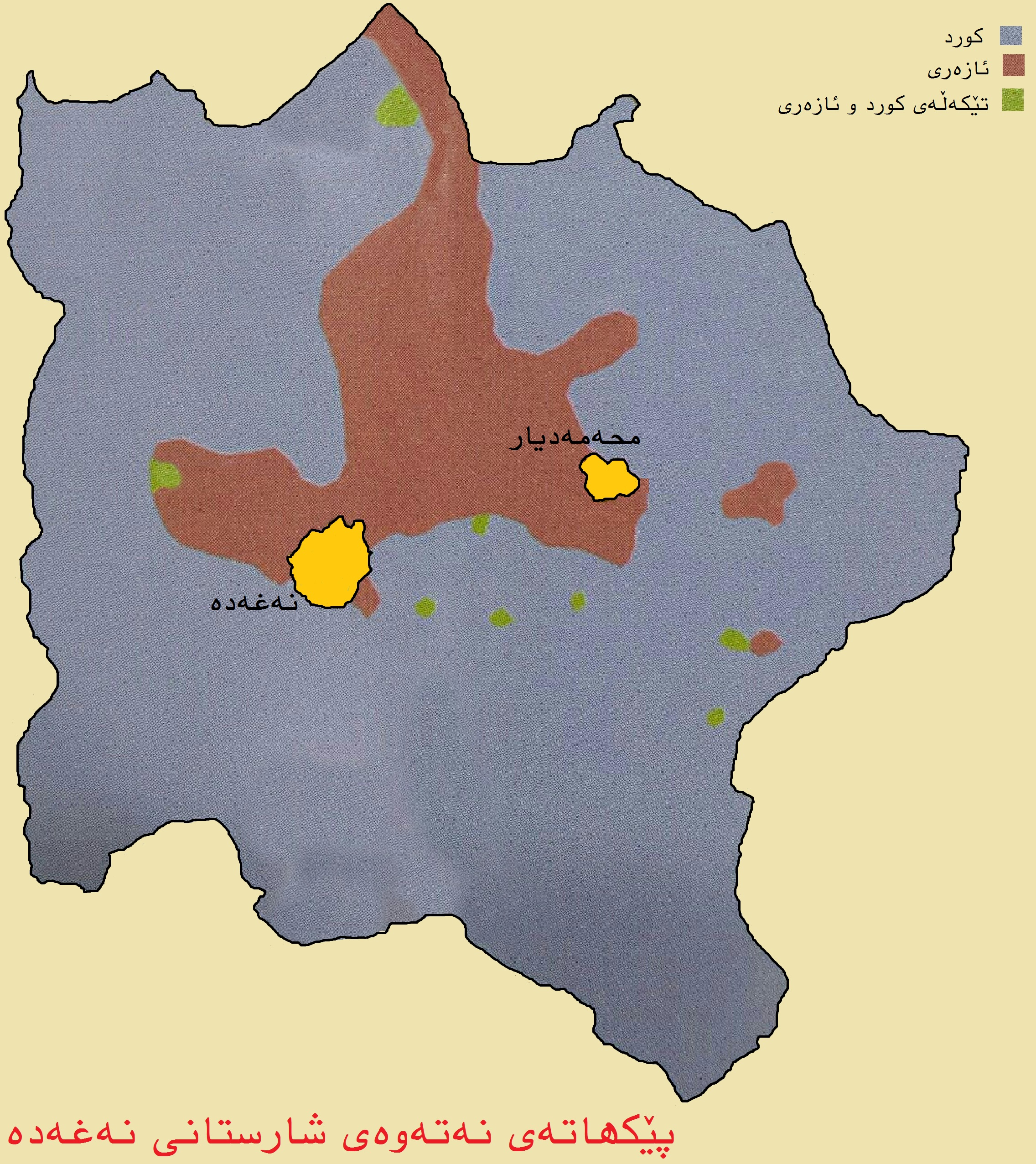 کوردی: شارستانی نەغەدە